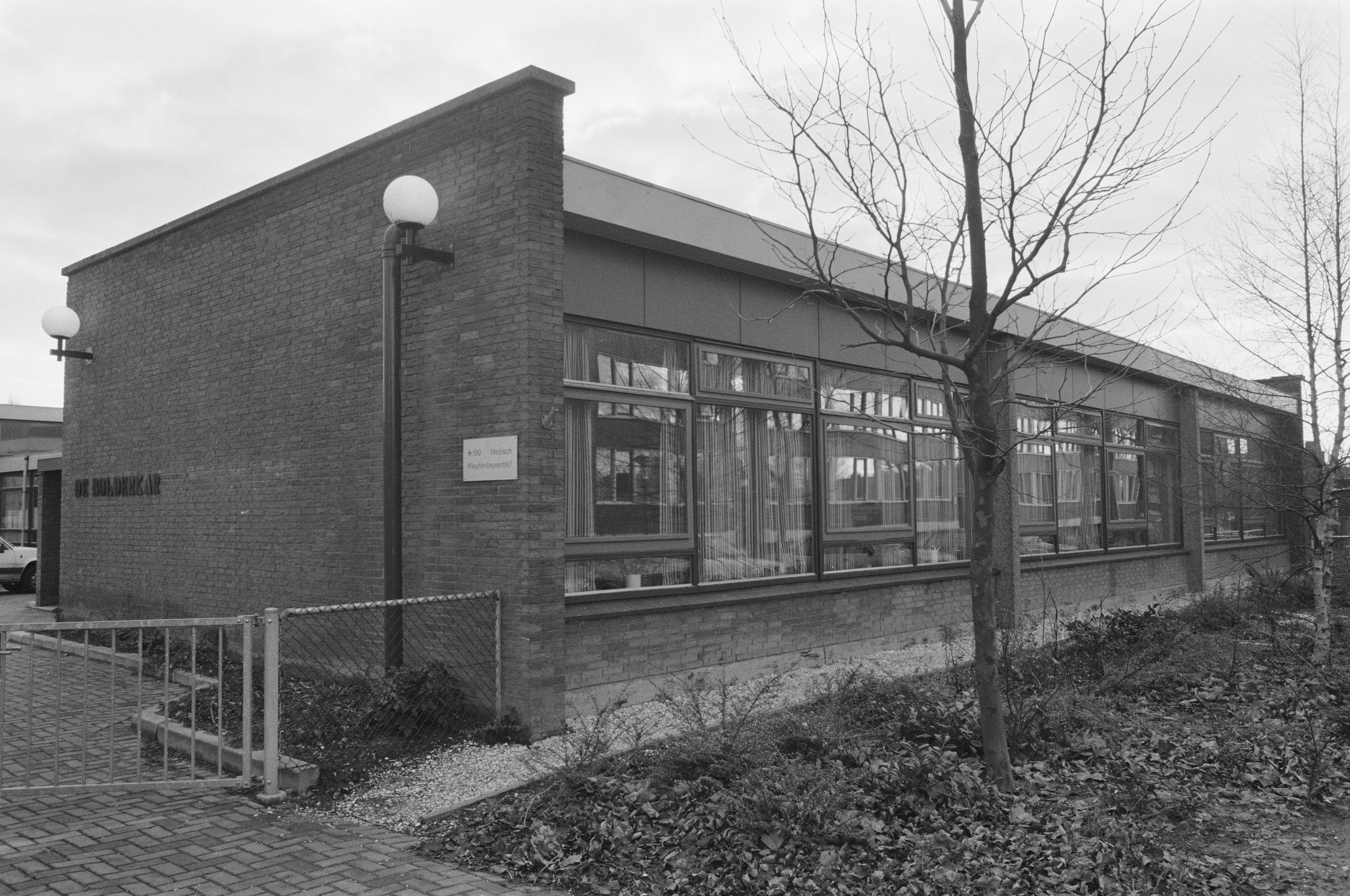 Collectie / Archief : Fotocollectie Anefo Reportage / Serie : [ onbekend ] Beschrijving : Exterieur medisch kinderdagverblijf De Bolderkar in Vlaardingen Datum : 20 december 1988 Locatie : Vlaardingen, Zuid-Holland Trefwoorden : gebouwen, kinderdagverblijven Fotograaf : Croes, Rob C. / Anefo Auteursrechthebbende : Nationaal Archief Materiaalsoort : Negatief (zwart/wit) Nummer archiefinventaris : bekijk toegang 2.24.01.05 Bestanddeelnummer : 934-3781